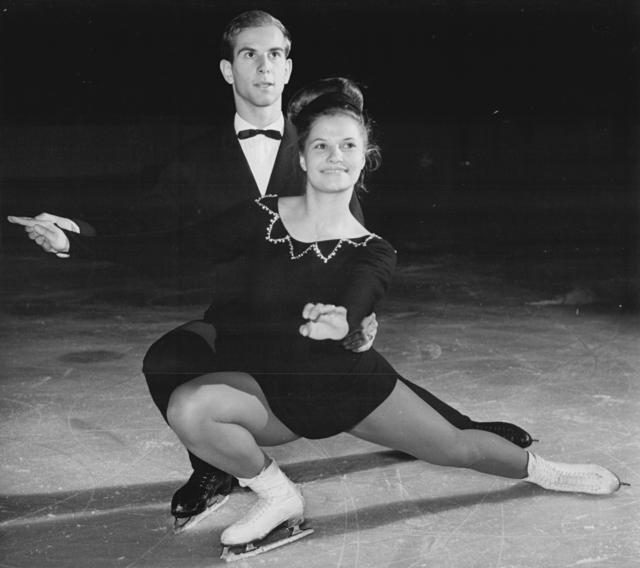 Brigitte Wockoeck, Heinz-Ulrich Walther Zentralbild Kohls-Studrè 11.12.1963 Olympia-Ausscheidungen im Eiskunstlauf stehen bevor. Um die noch zu vergebenden Plätze für die gemeinsame deutsche Olympiamannschaft geht es bei den Olympia-Ausscheidungen zwischen den Eiskunstläufern der DDR und Westdeutschland, die am 12.12.1963 in der Berliner Werner-Seelenbinder-Halle und am 19.12.1963 in Westberlin stattfinden. UBz: Auch das DDR-Paar Brigitte Wockoeck - Heinz Ulrich Walther (SC Dynamo Berlin) hofft bei den Ausscheidungen gegen die westdeutschen Vertreter erfolgreich abzuschneiden.